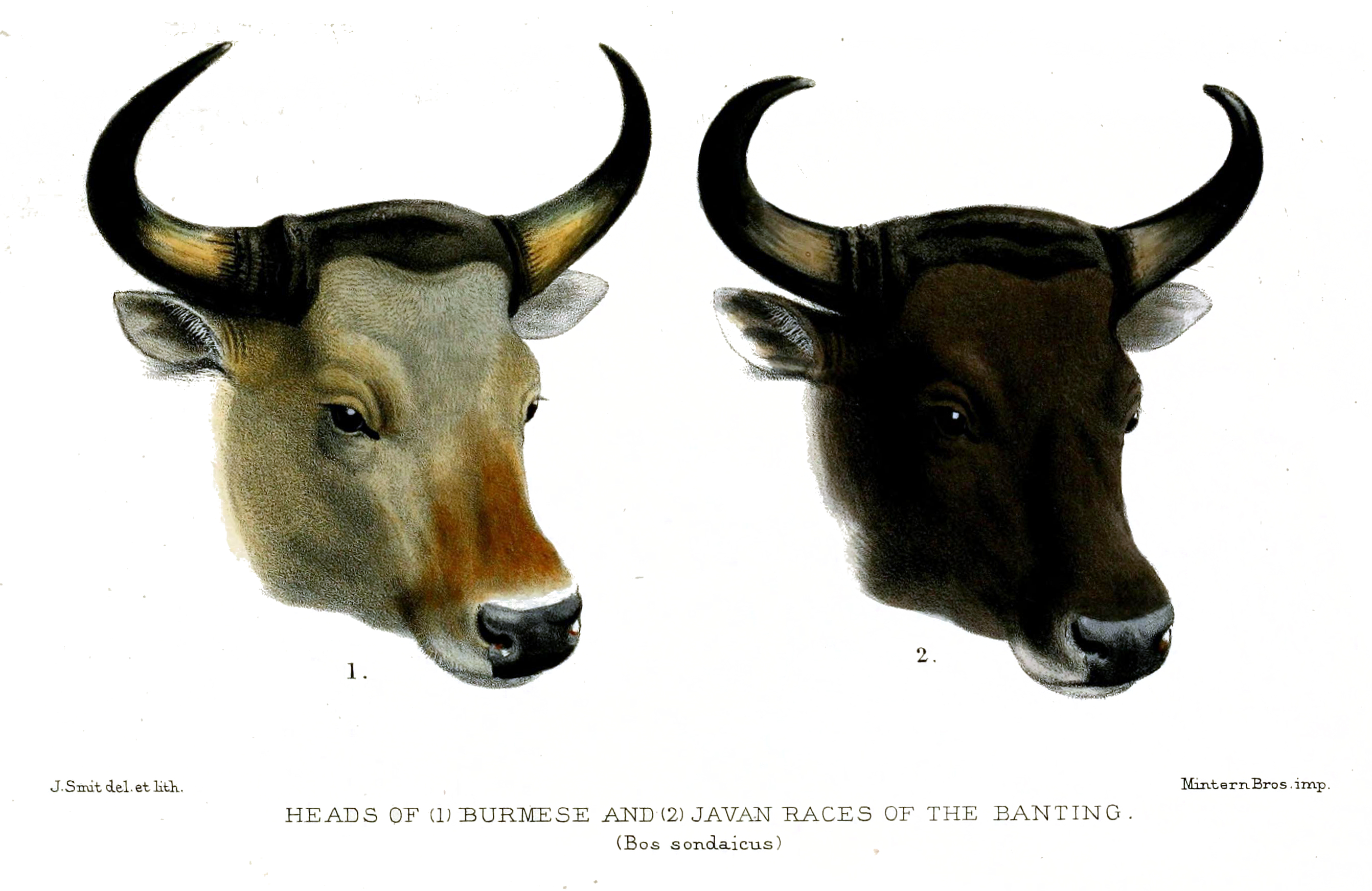 Banteng heads